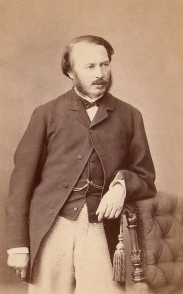 Le duc de Persigny